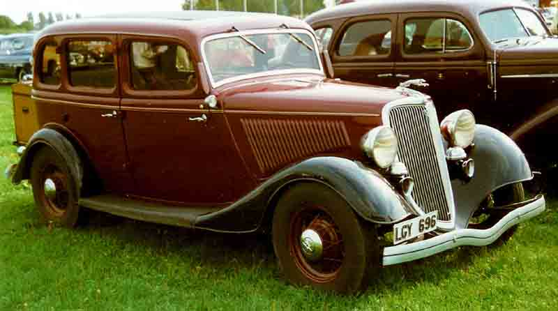 Ford Model 40 730 De Luxe Fordor Sedan 1934